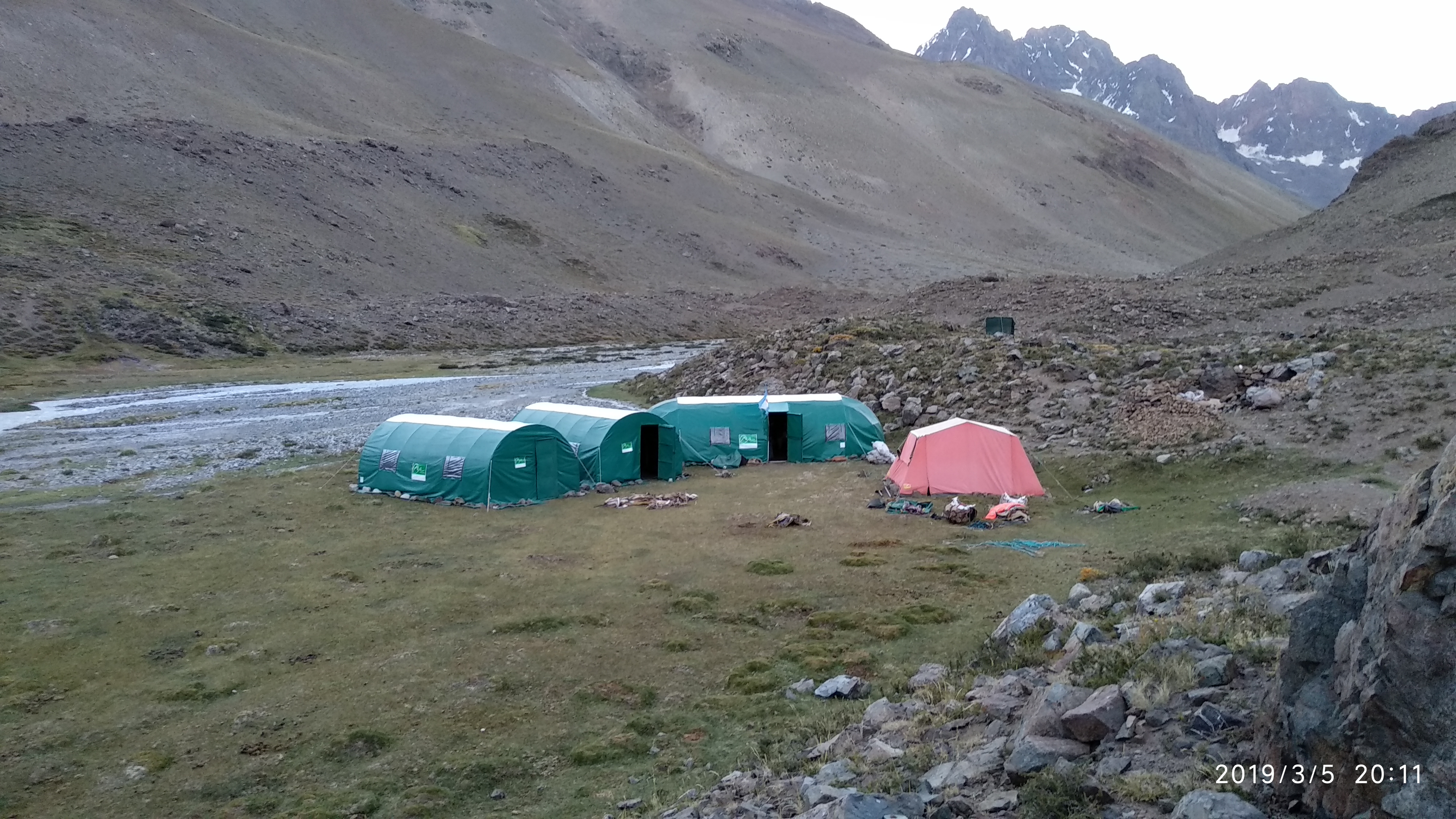 Campamento El Barroso base hacia el lugar del accidente de los andes